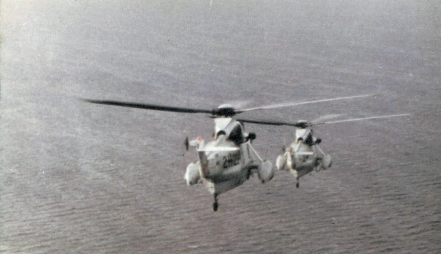 Es muy conocido el puente aéreo permanente que mantuvieron los aviones C-130 Hércules de la FAA y algunos Electra de la Armada entre nuestras Islas y el continente. Menos conocido, pero igualmente audaz, es el rescate llevado a cabo por dos helicópteros Sea King de la Armada en Isla Borbón (norte del estrecho de San Carlos). El 31 de Mayo trajeron de vuelta al continente a 10 miembros de la estación aeronaval, inutilizada por un ataque del SAS el 15 de Mayo. La foto los muestra durante los primeros minutos de vuelo.